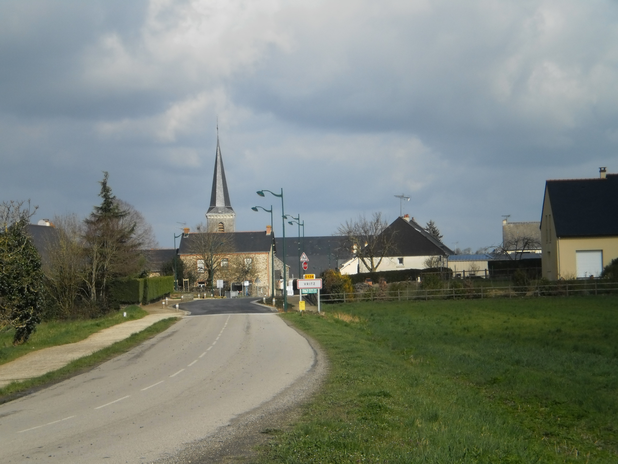 Vritz (Loire-Atlantique, France) - panorama